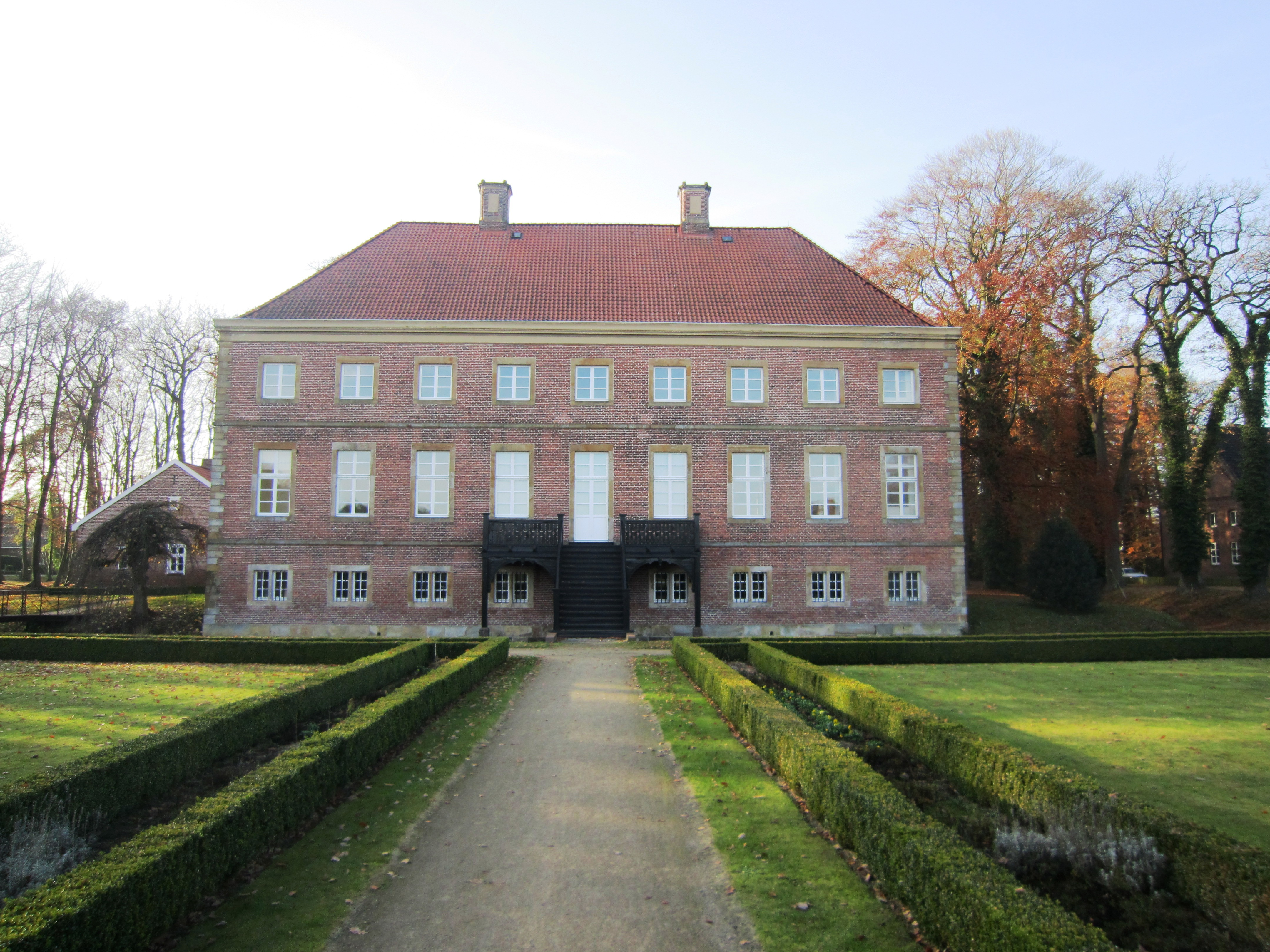 Gut Altenkamp - Aschendorf - Duitsland